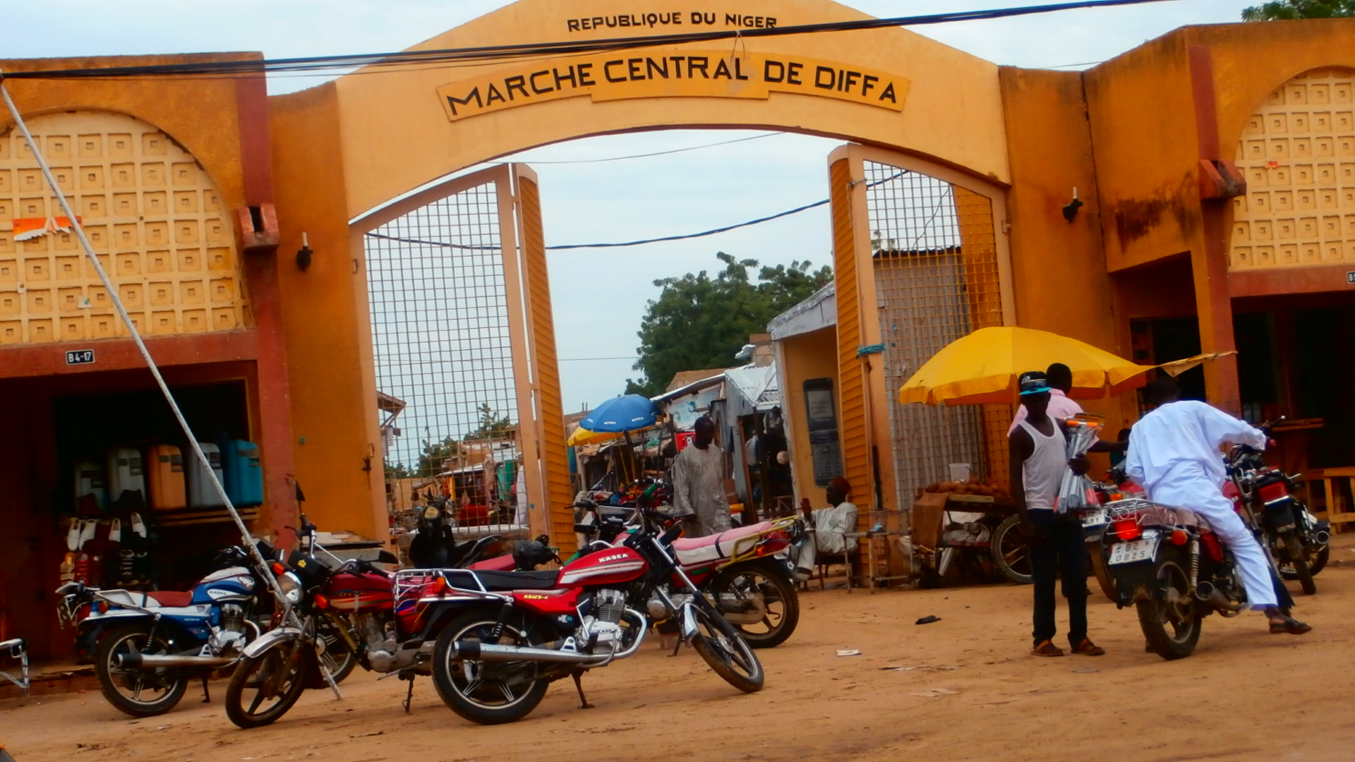 Marché de la ville de Diffa